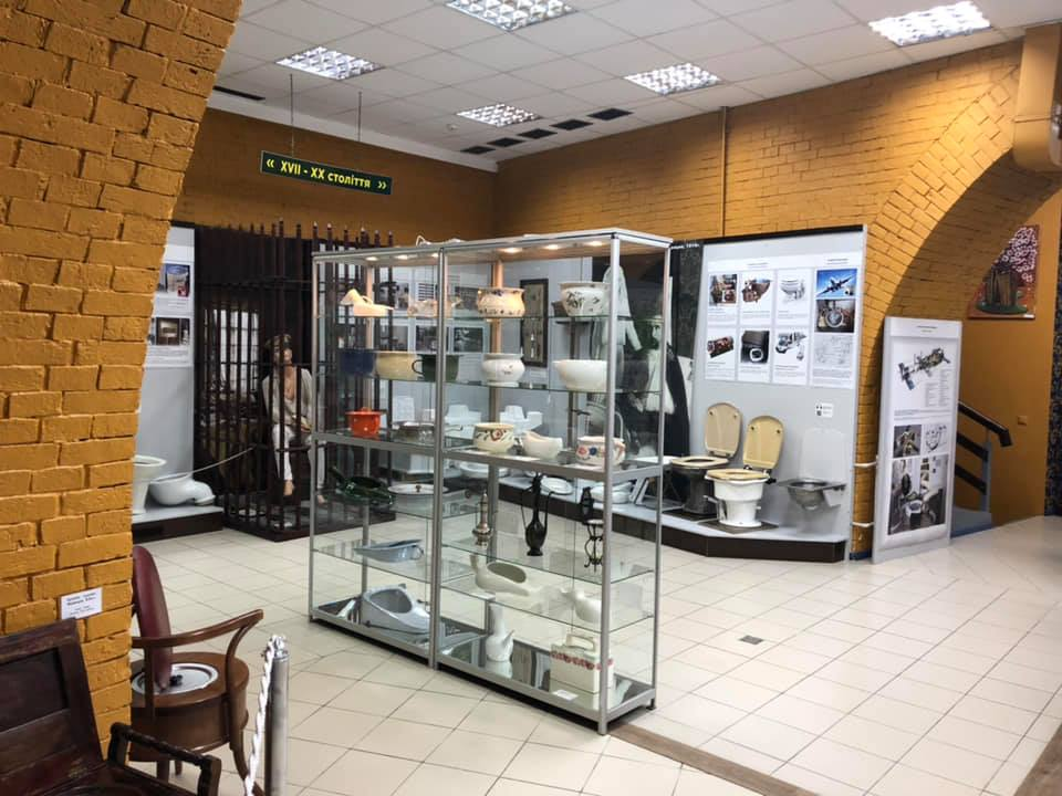 Колекція нічних ваз в Музеї історії туалету (Київ)